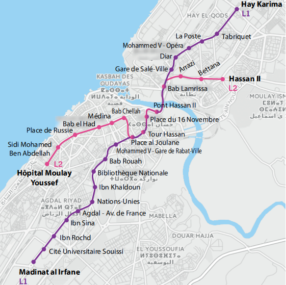 Plan du réseau de tramway de l'agglomération de Rabat-Salé au Maroc